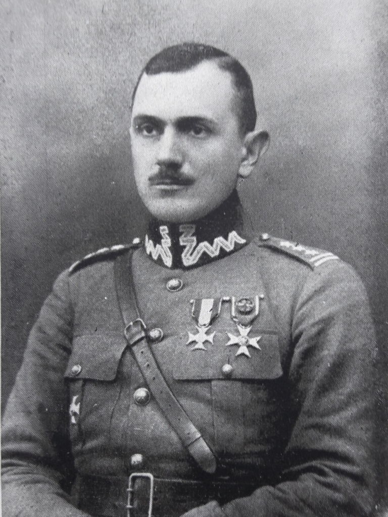 Gen. bryg. Bolesław Jatelnicki - w roku 1922 płk, pierwszy komendant i organizator Wielkopolskiej Szkoły Podchorążych Piechoty w Poznaniu, przeniesionej w 1920 r. do Bydgoszczy. Kawaler Orderu Virtuti Militari V klasy